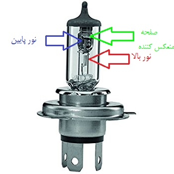 اجزای لامپ هالوژن خورو